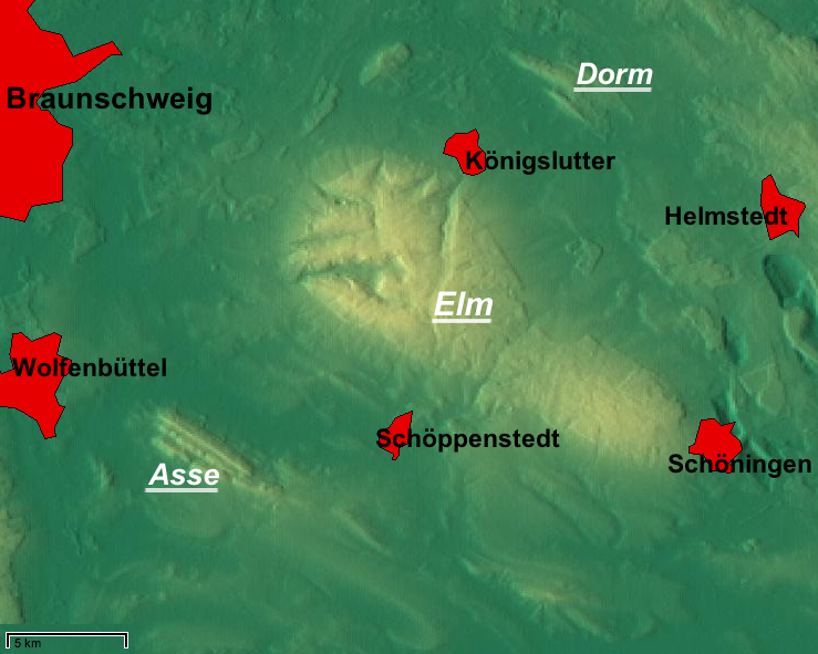 Reliefkarte der beiden Höhenzüge Asse, Elm und Dorm in Niedersachsen, Deutschland. – Die Karte ist genordet, ein grober Maßstab ist unten links; zur Orientierung sind größere Städte eingezeichnet.